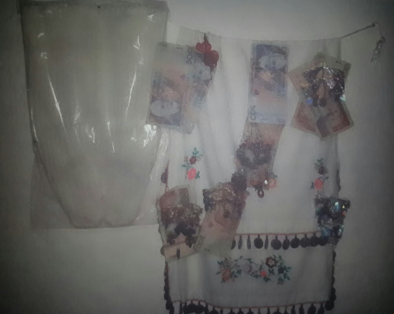 Ekspozimi i shamisë së nuses